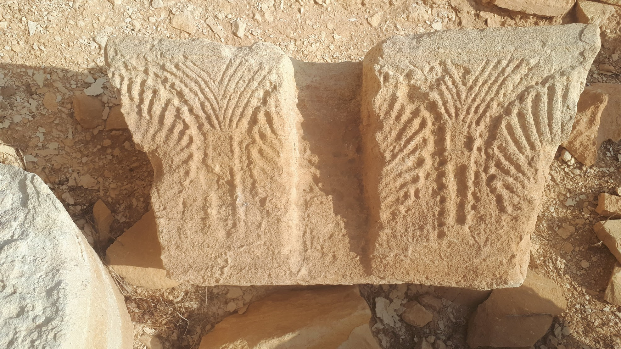 כותרת עמוד בכנסיה המרכזית עם חריטת עצי דקל